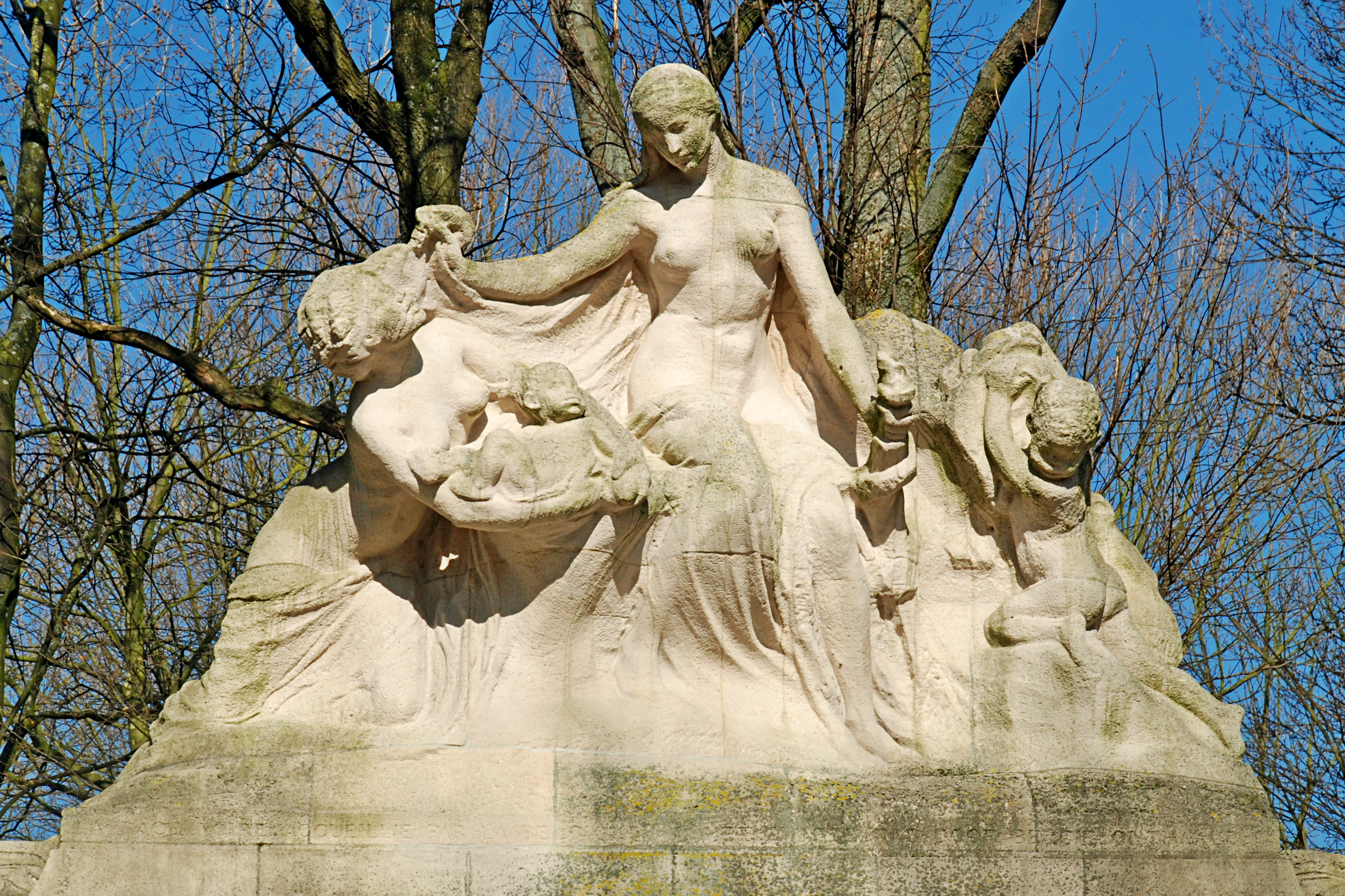 Belgique - Bruxelles - Cinquantenaire - Monument aux pionniers belges au Congo (Thomas Vinçotte)